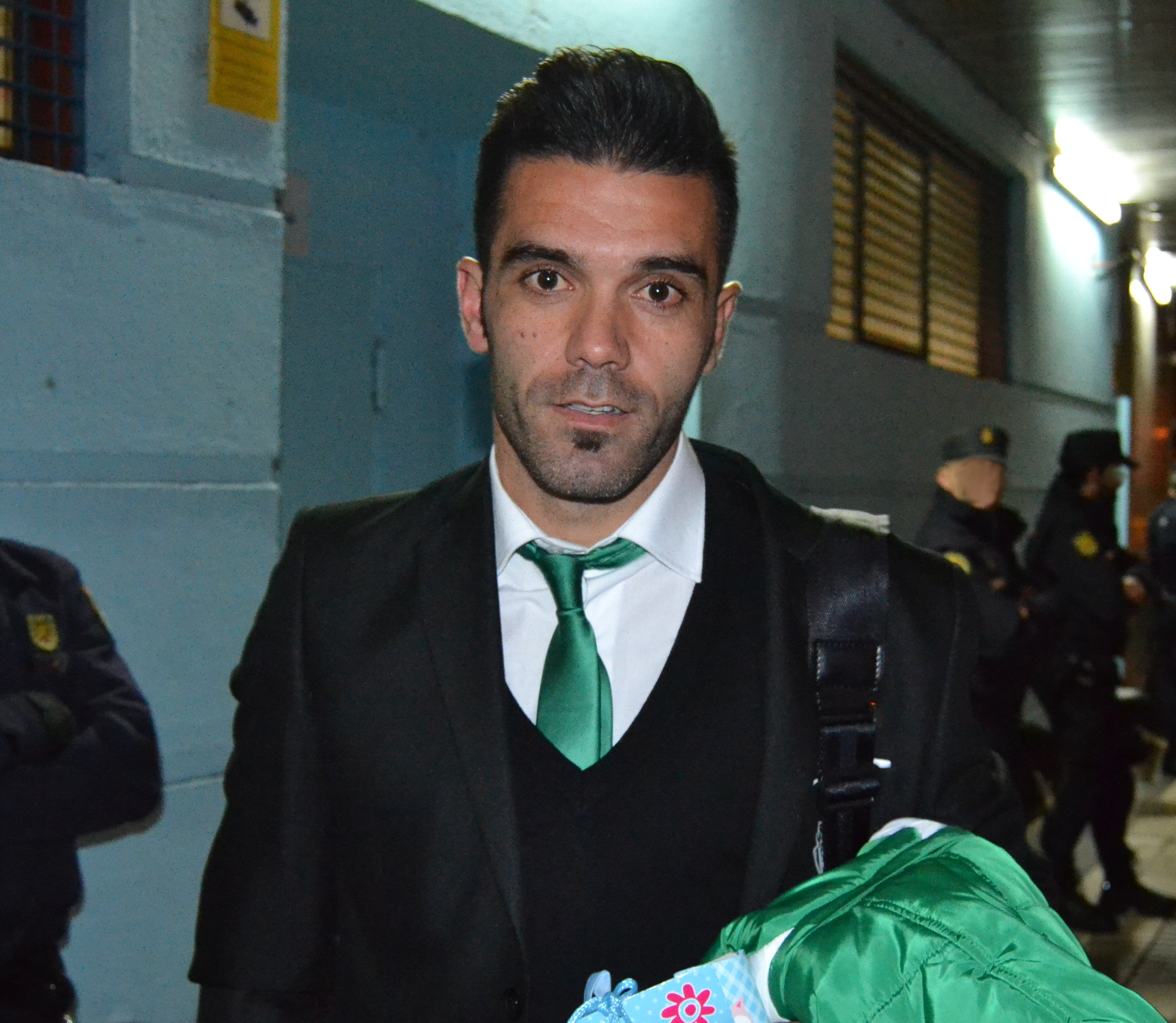 O futbolista Iago Bouzón